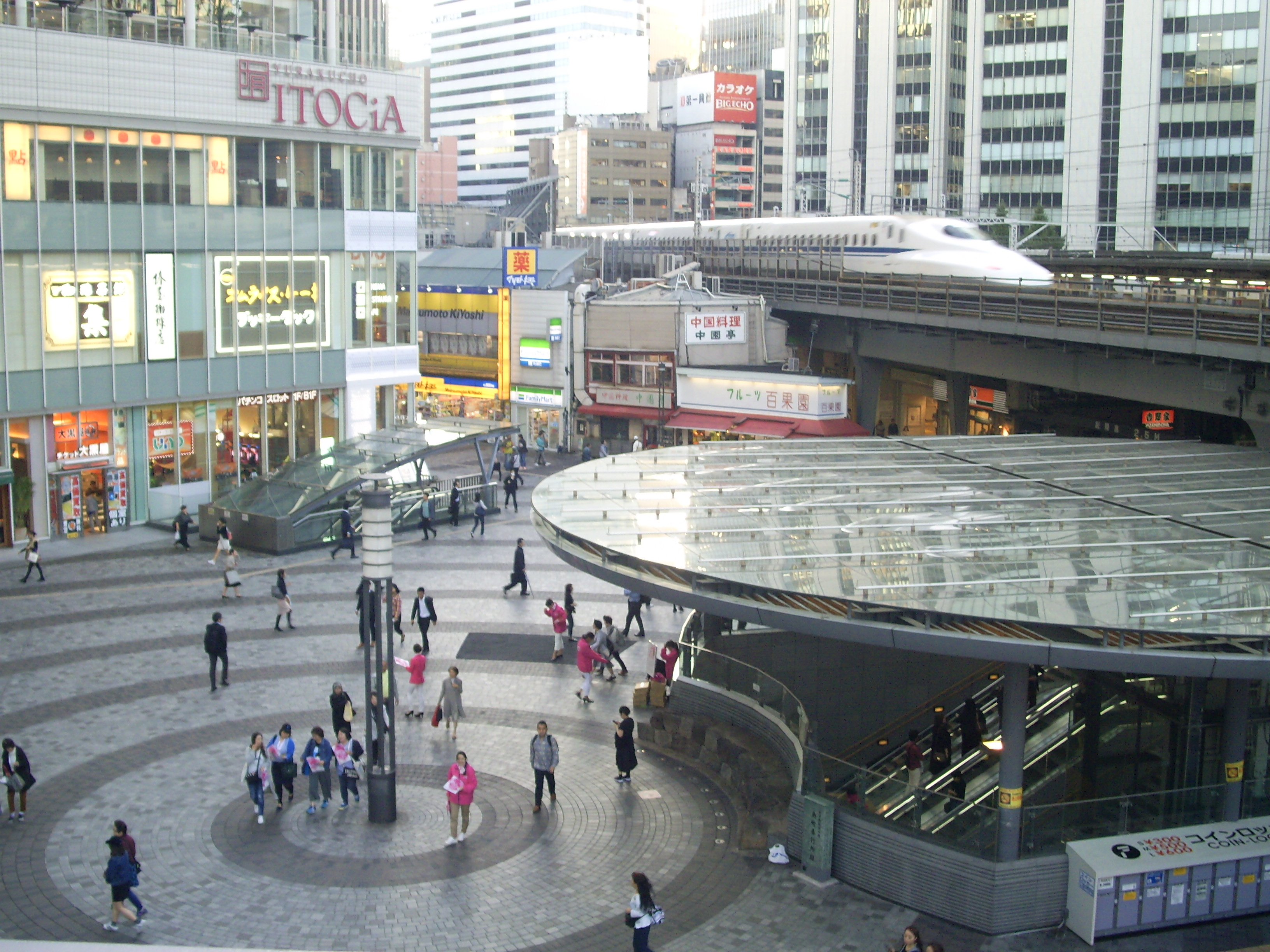 有楽町駅前広場、交通会館屋上デッキから撮影 ㊟カメラを起動すると日付機能が出荷時のものに初期化されるため、ファイル履歴の撮影・投稿日時とメタデータの原画像データの生成日時が異なります